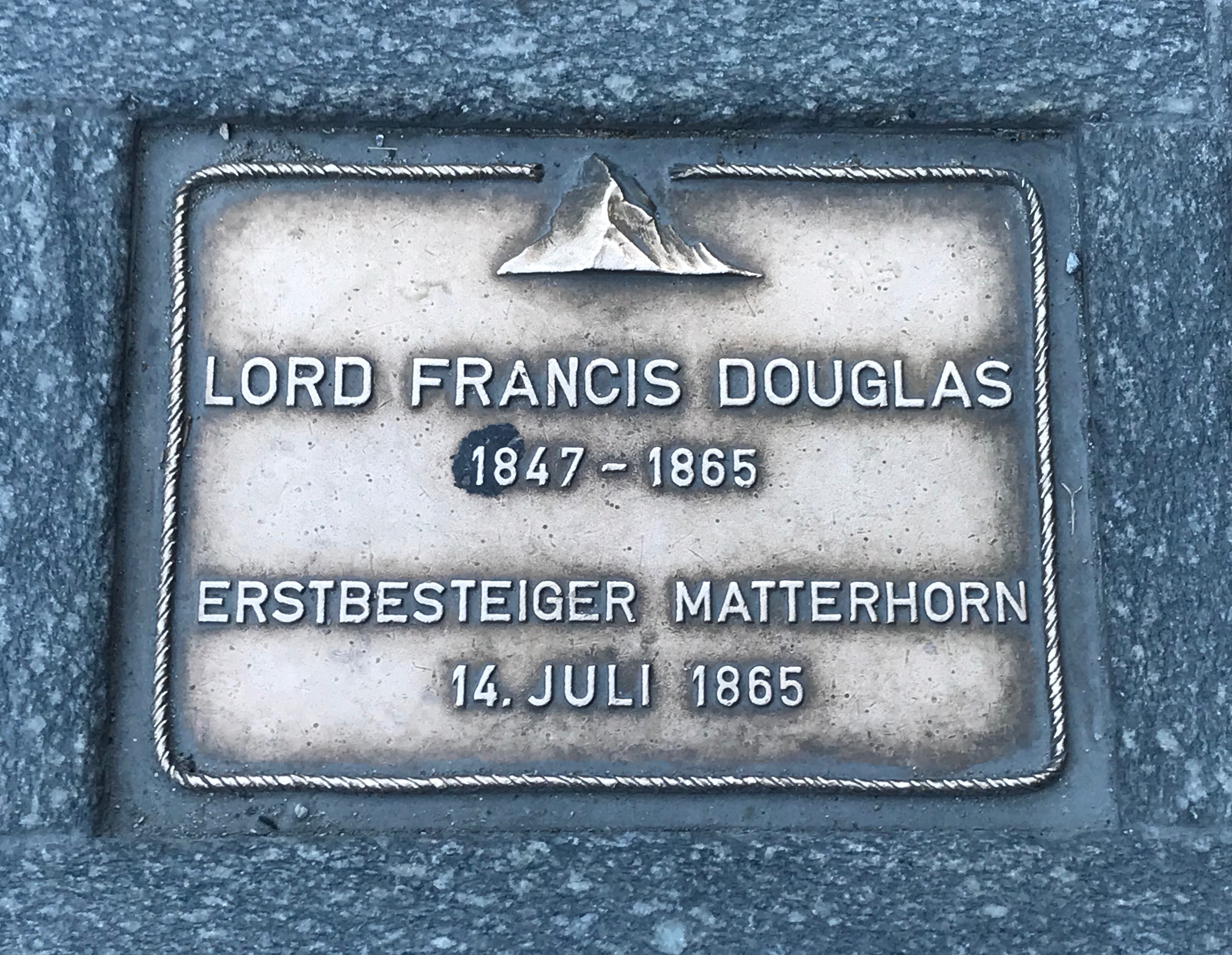 Gedenktafel in Zermatt